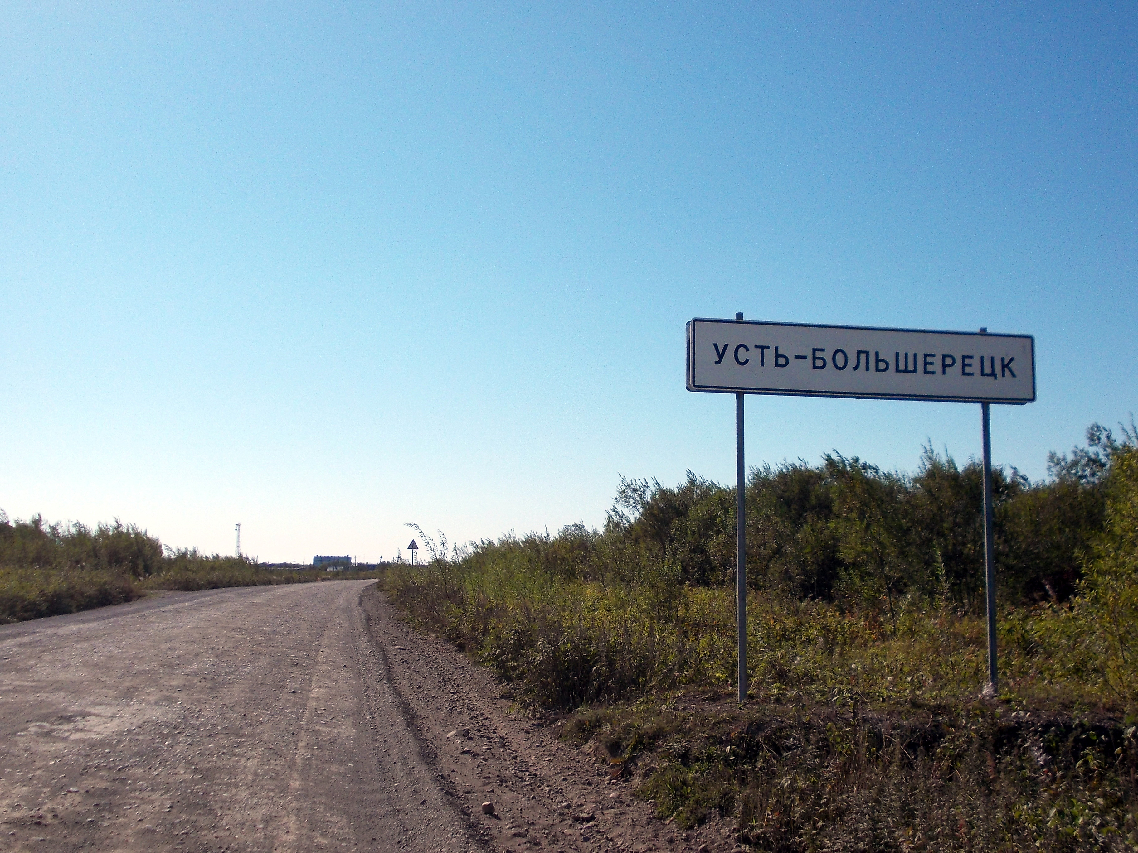 Ust'-Bolszerieck przy wjeżdzie od strony Pietropawłowska Kamczackiego